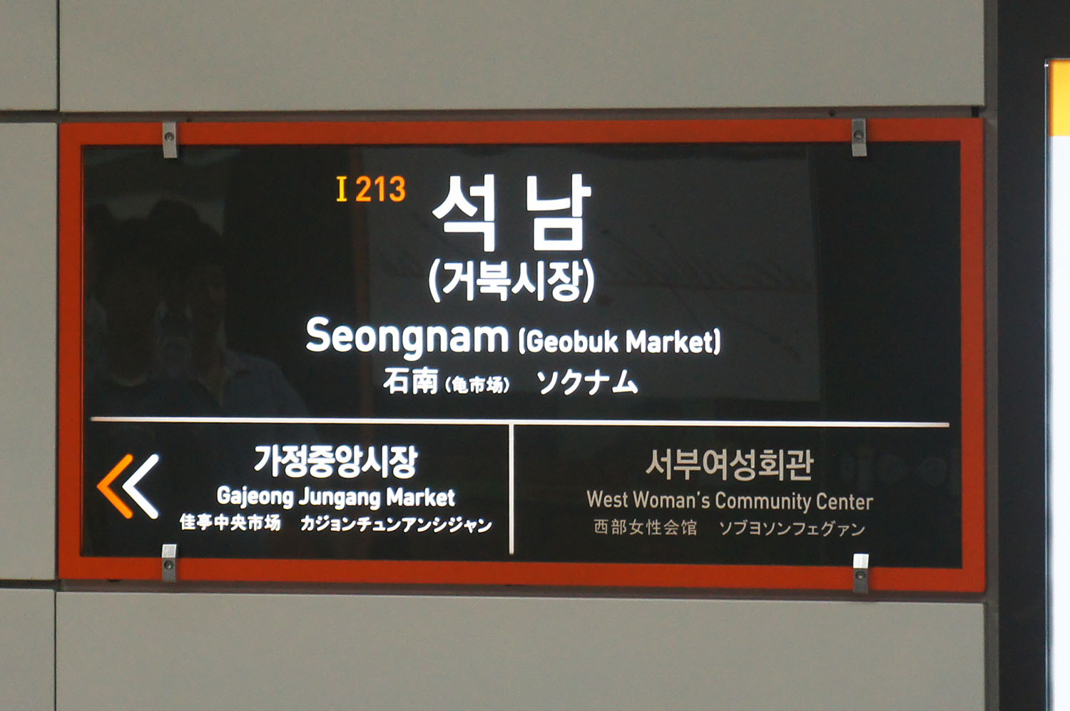 석남역 역명판